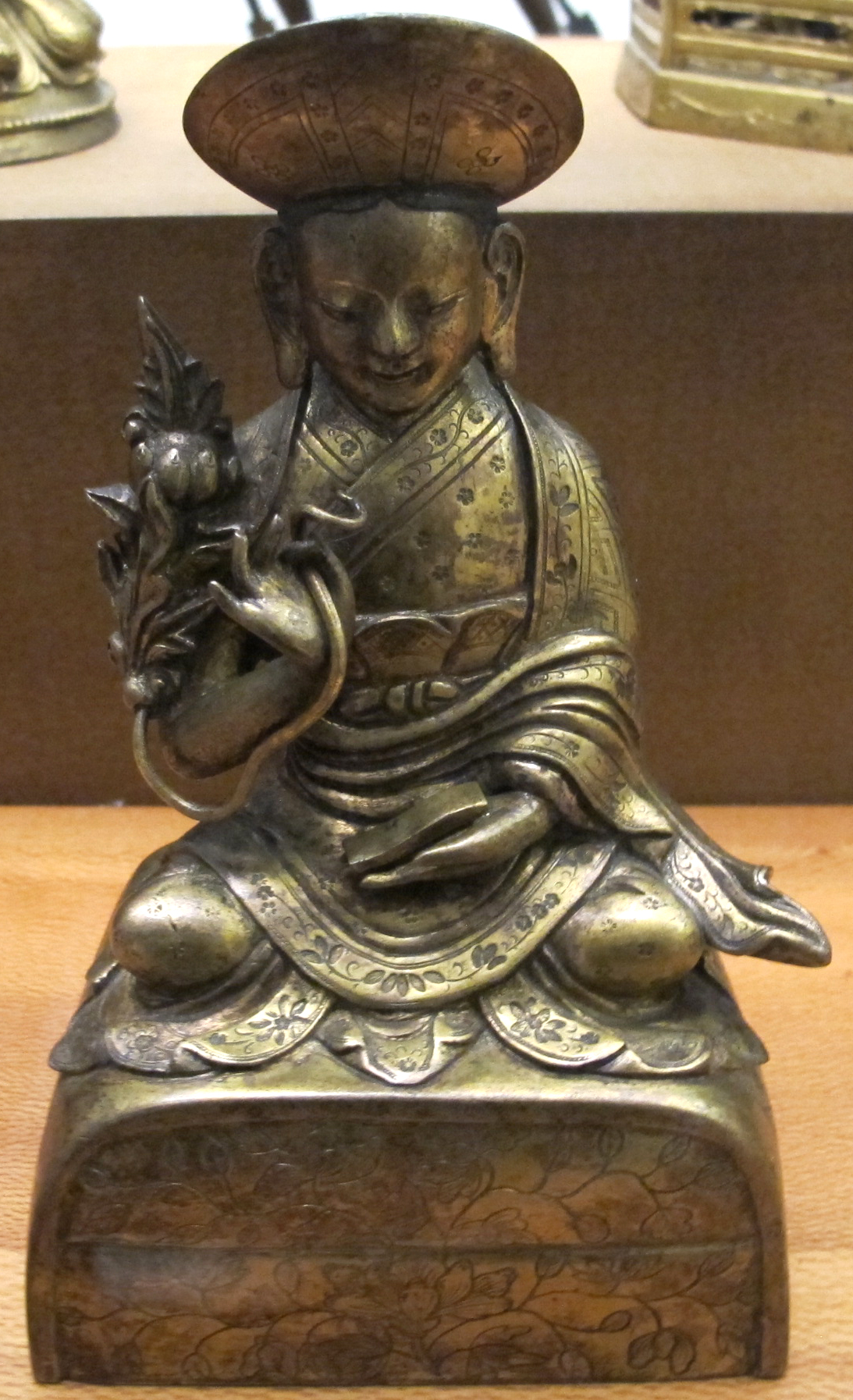 Tibet, religioso della scuola drukpa, xviii sec